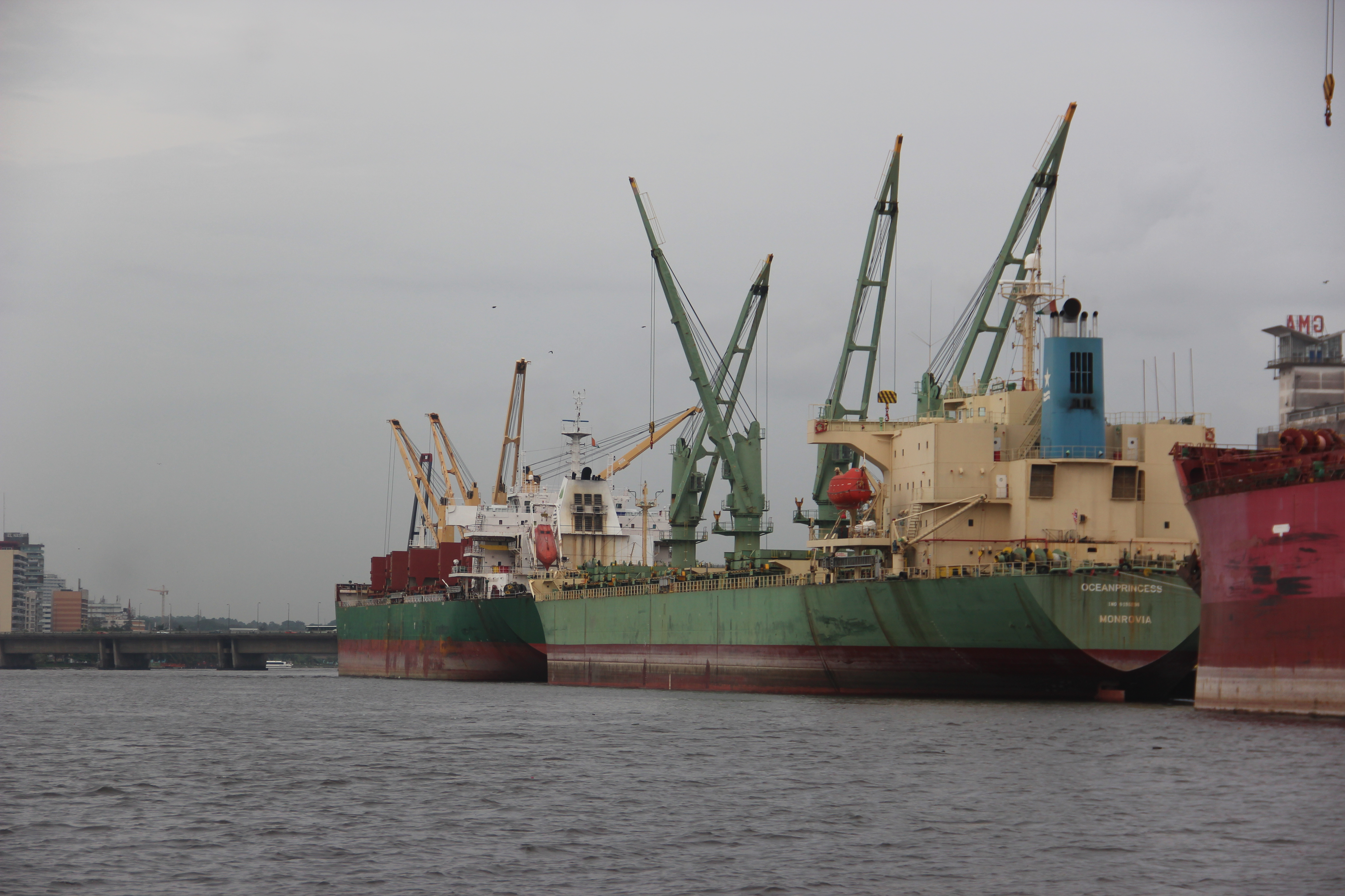 Bateau "Ocean Princess" dans la lagune d'Abidjan. This is an image with the theme "Africa on the Move or Transport" from: Ivory Coast